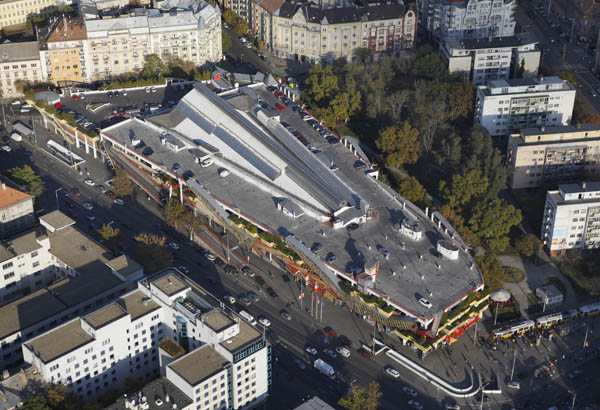 A Lehel Csarnok légi felvételen